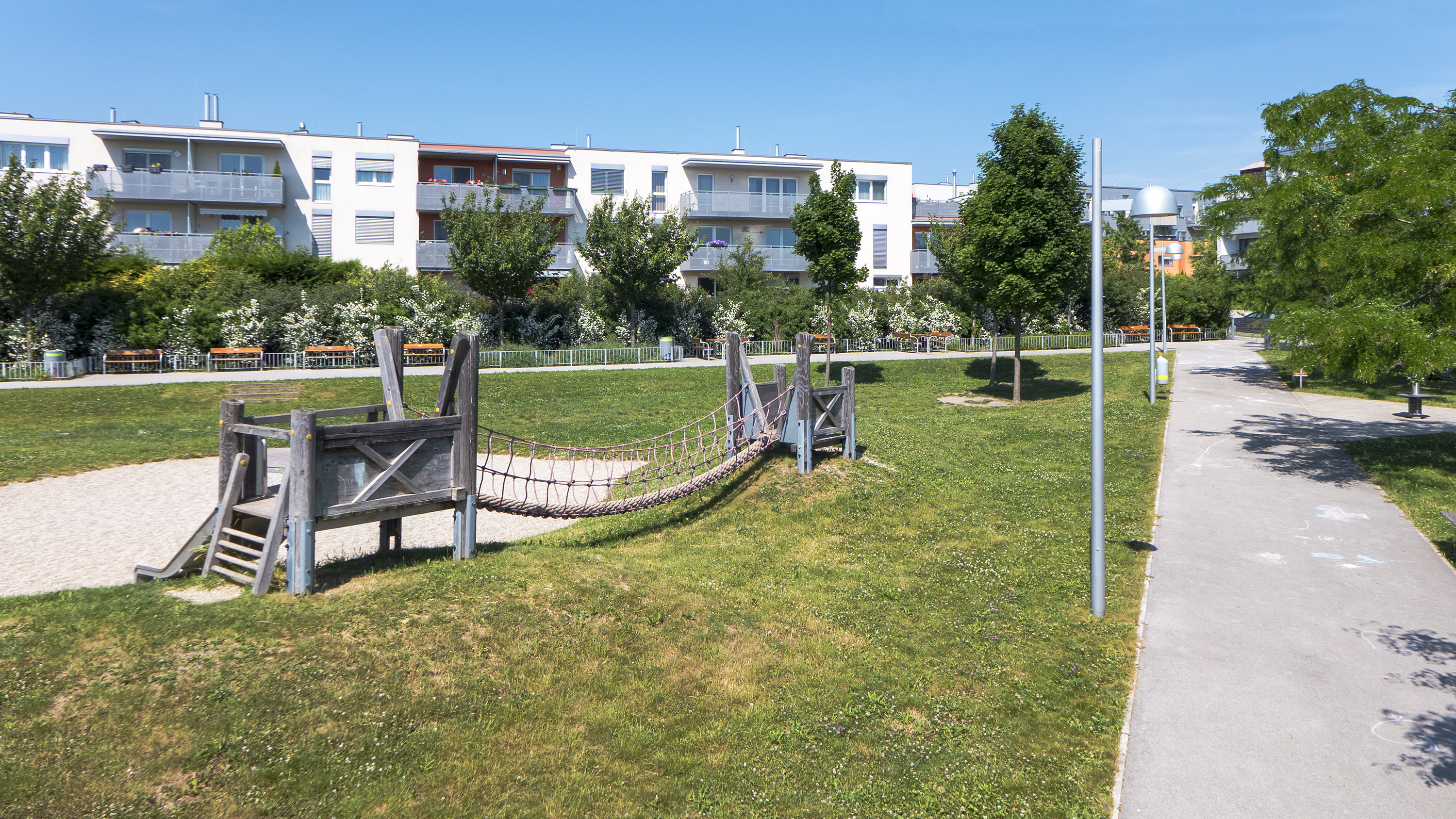 Grundäckerpark in Wien 10